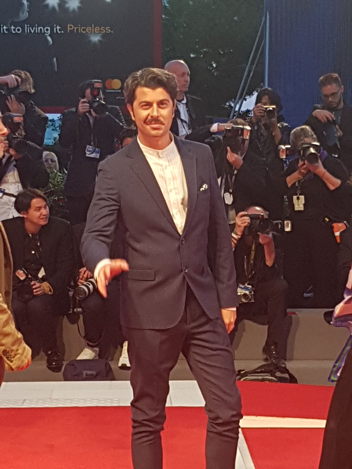 74°festival internazionale di Venezia